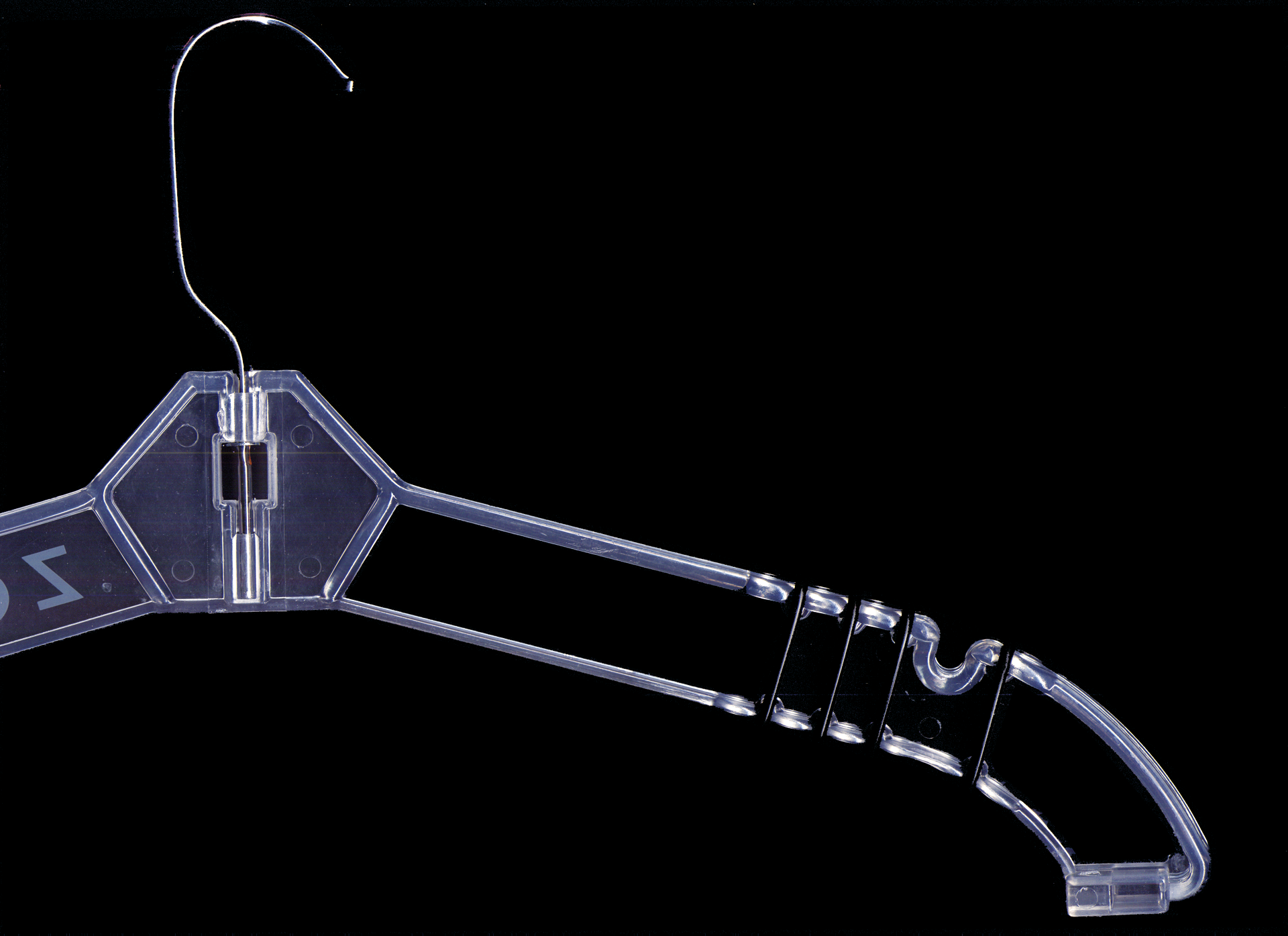 zero Kleiderbügel aus PP hergestellt mit Antirutschhemmer. Industriell in großen Stückzahlen im Spritzguss herstellbar